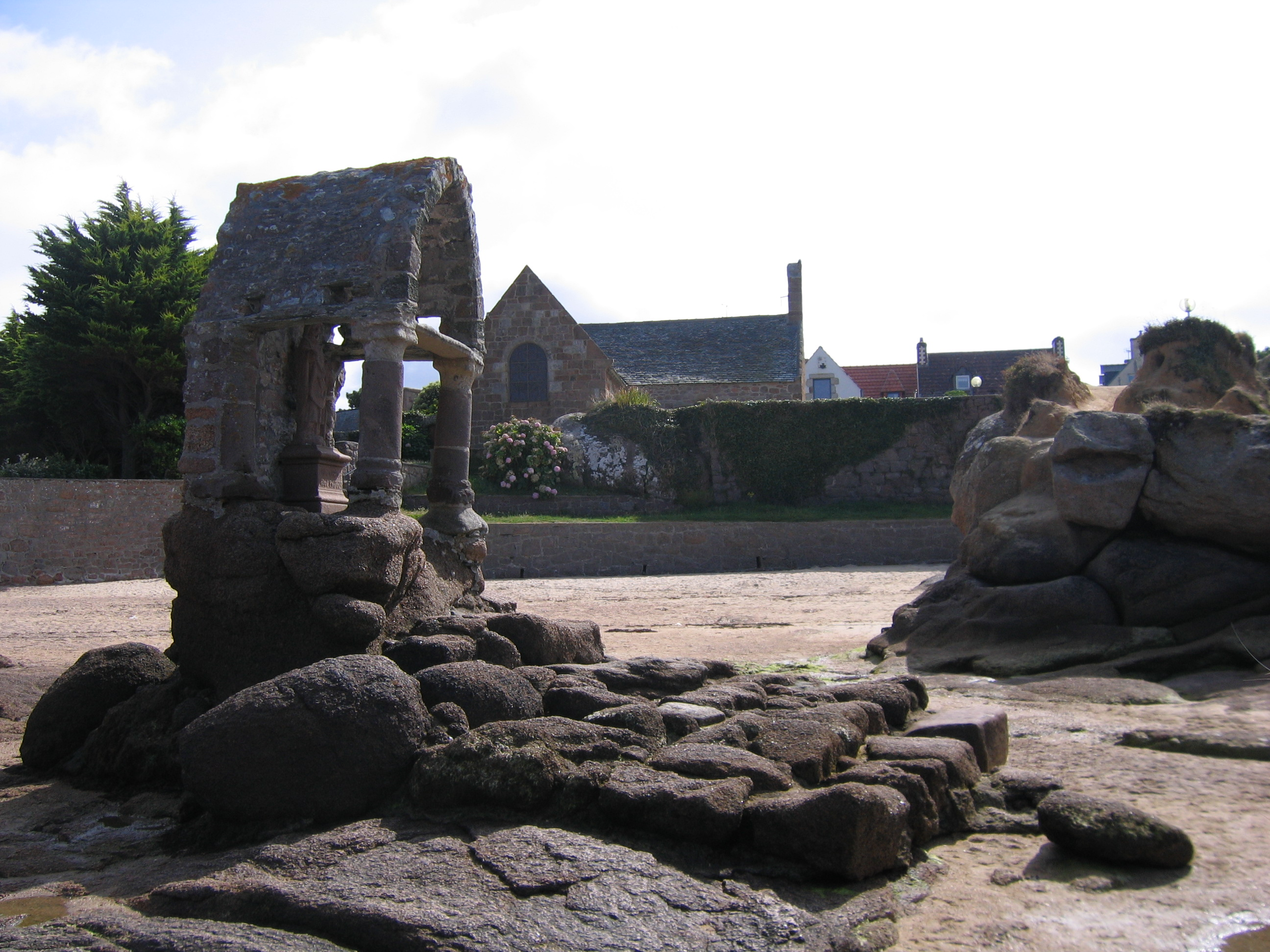 Trégastel dans les Côtes-d'Armor Bretagne